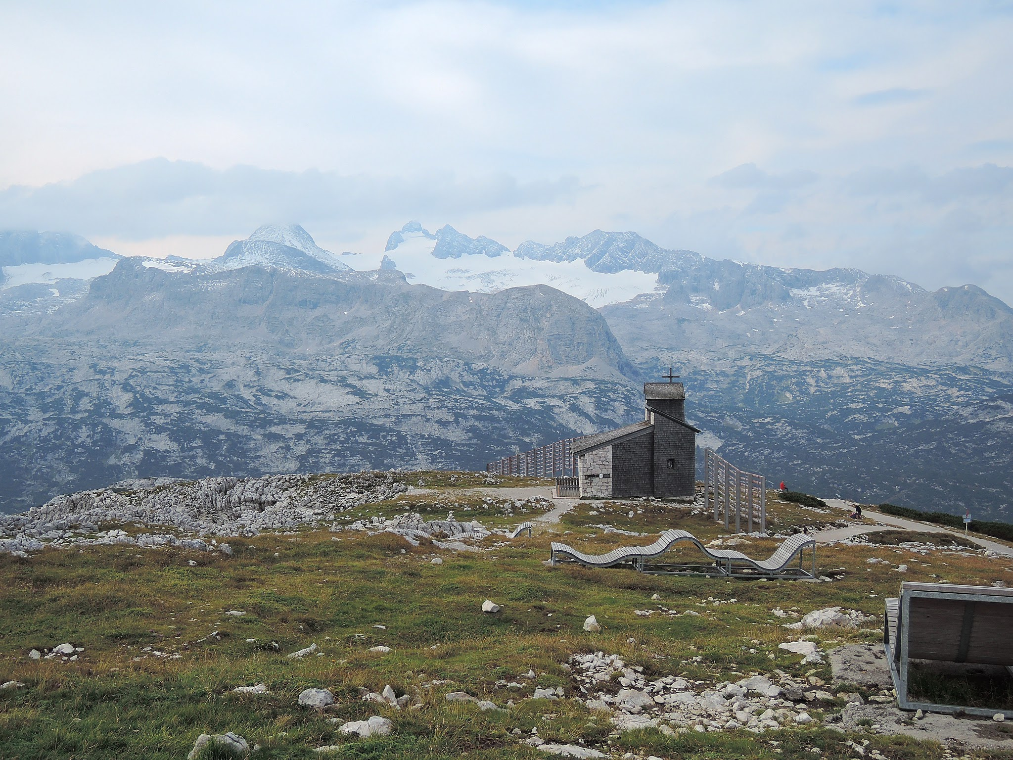 Obertraun, Austria